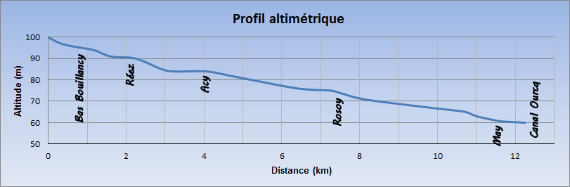 Gergogne, profil altimétrique (22 points).